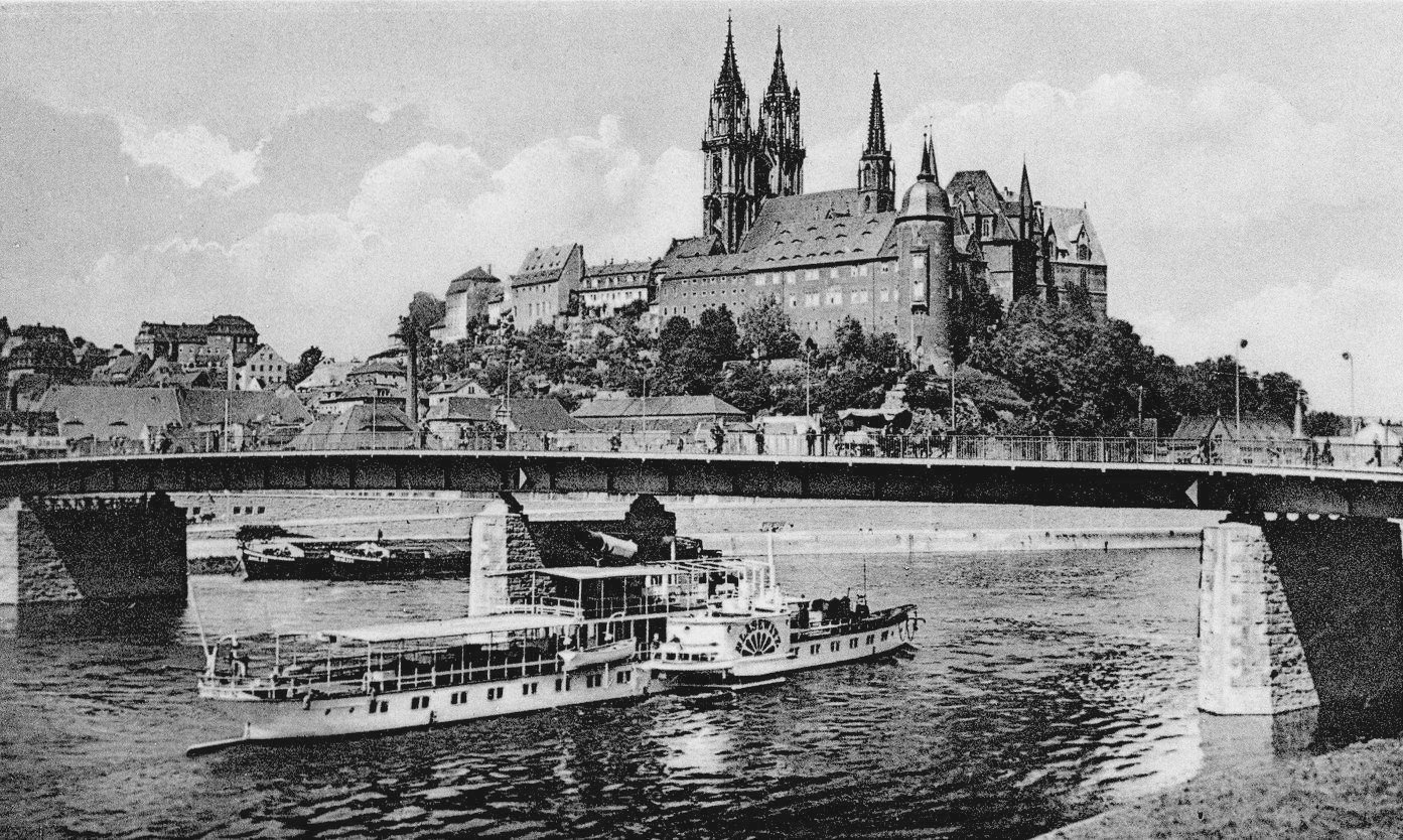 Meißen; Albrechtsburg und Dom - Elbe mit Dampfer Blasewitz This postcard is from publisher Brück & Sohn in Meißen ( postcard has a unique number 27395 and is available in a higher resolution at the publisher. This images was uploaded in a cooperation project between Wikipedians and the publisher.